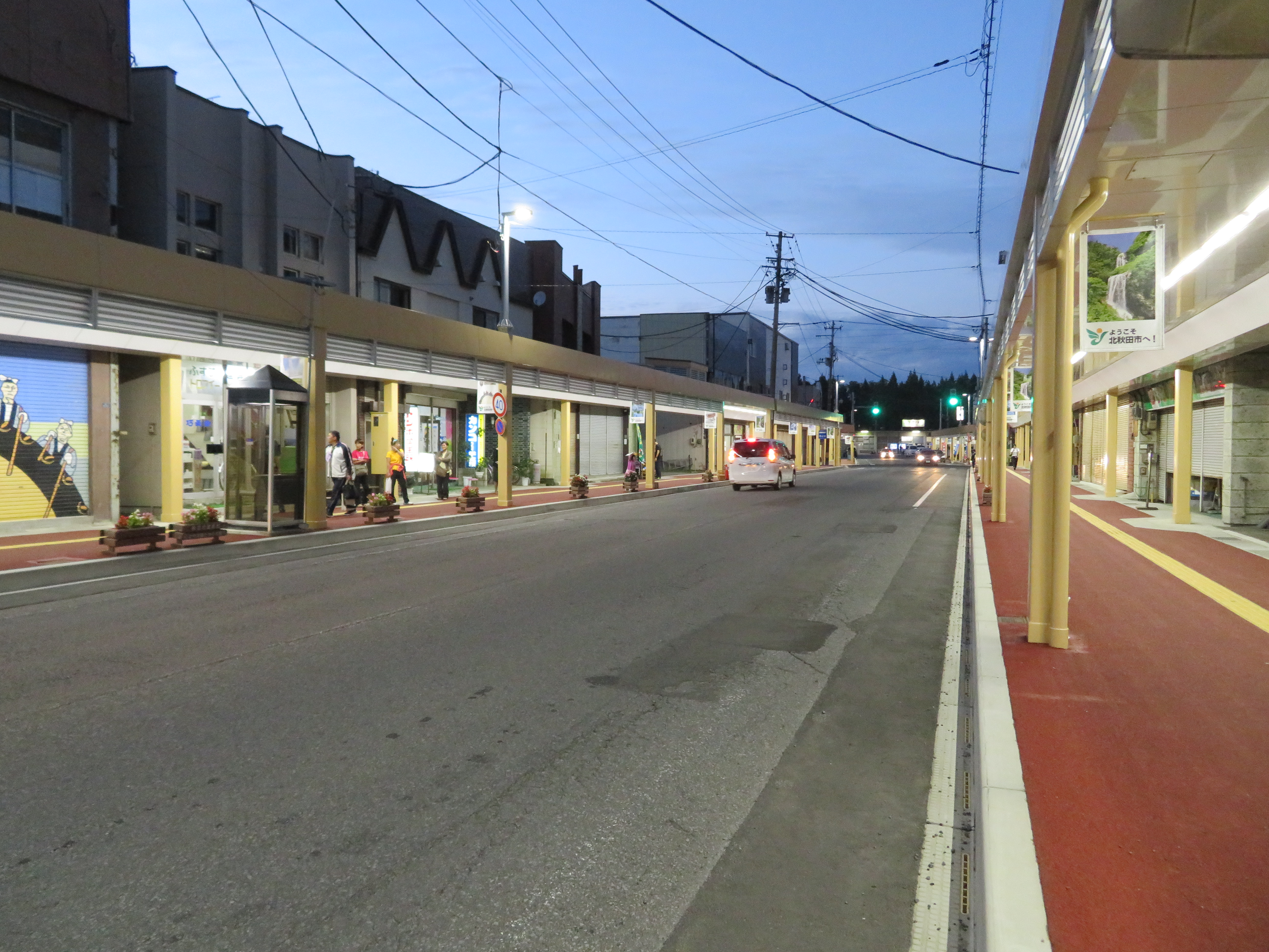 秋田県北秋田市鷹巣駅前商店街 Canon PowerShot SX720 HS